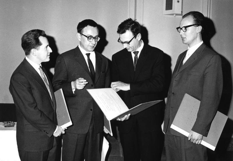 18.3.1961 West-Berlin Feierstunde anläßlich der Verleihung der Berliner Kunstpreise